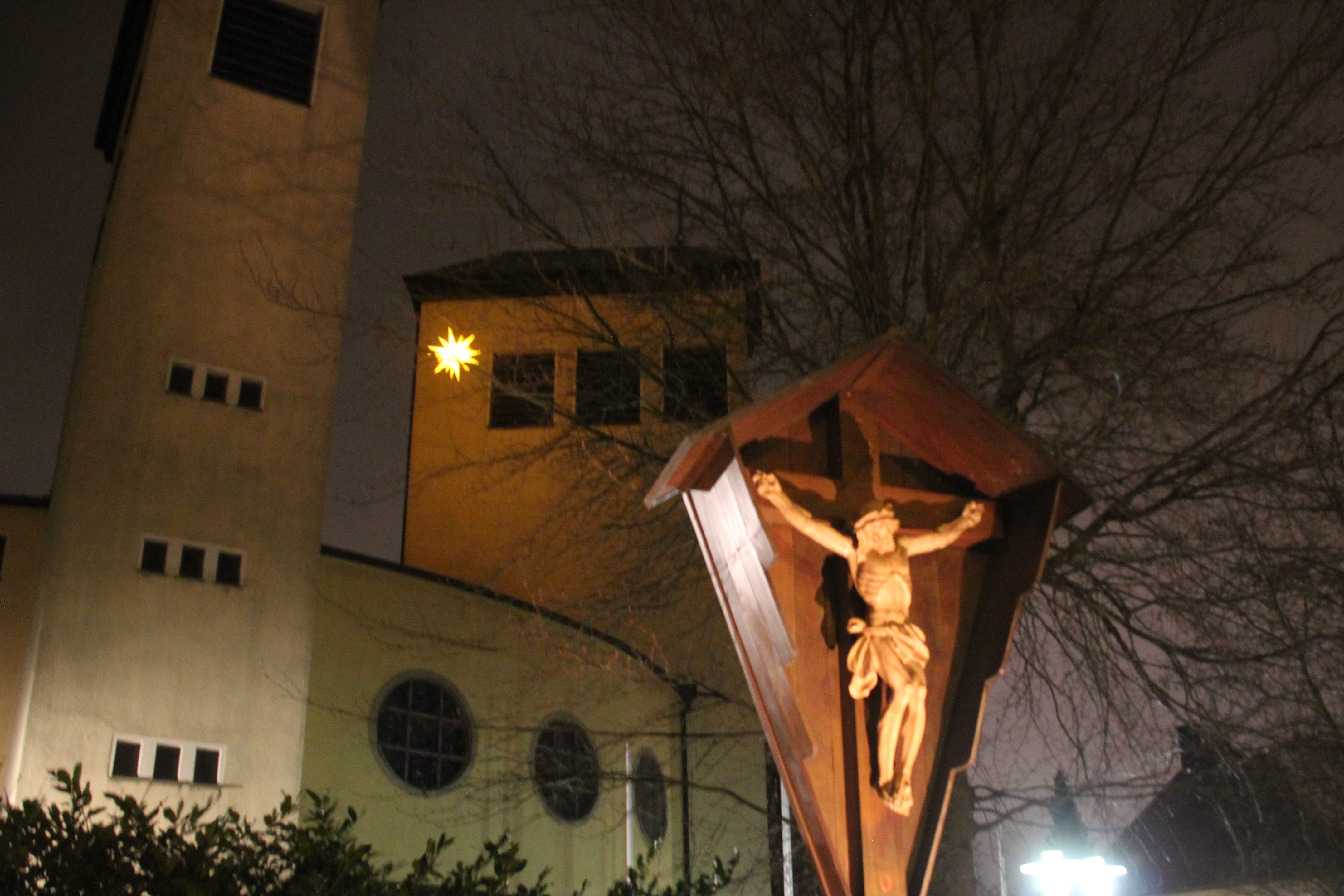 Essen, Kirche St. Fronleichnam: Das Kreuz zur Erinnerung an die Gemeindemissionen gehört zum festen Strassenbild in Bochold.